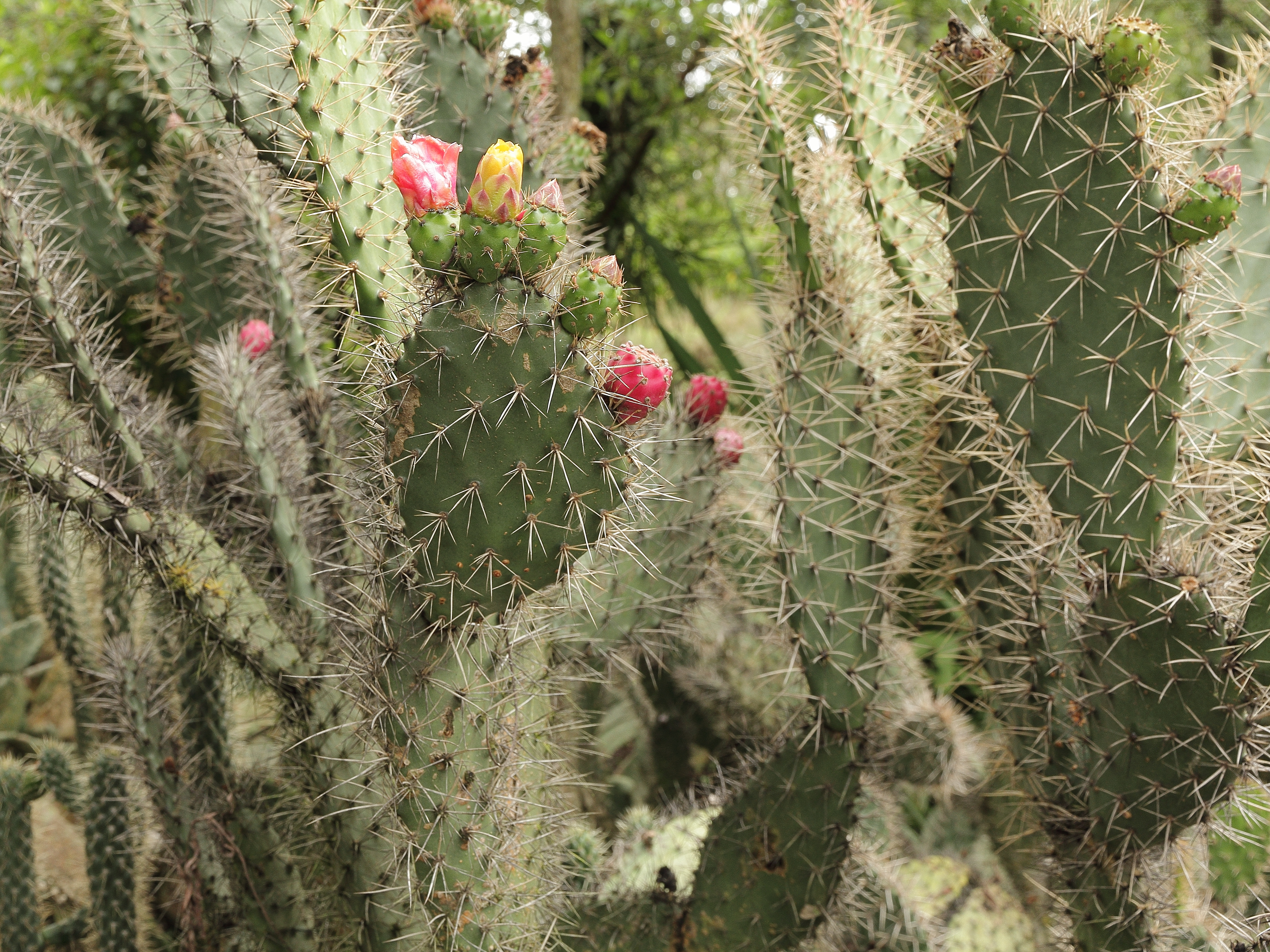 Opuntia soederstromiana i Quitos botaniska trädgård.